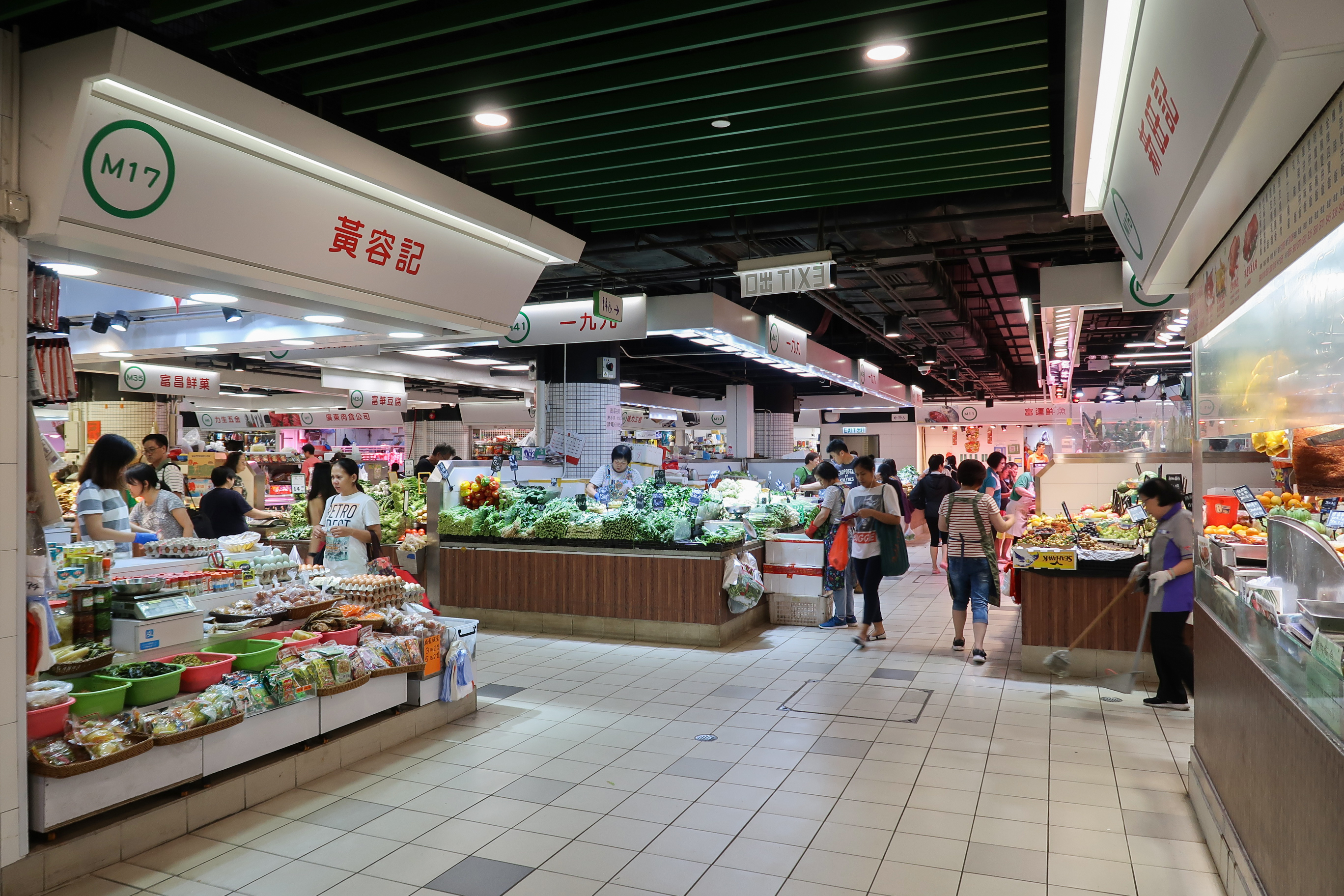 Fu Tung Market